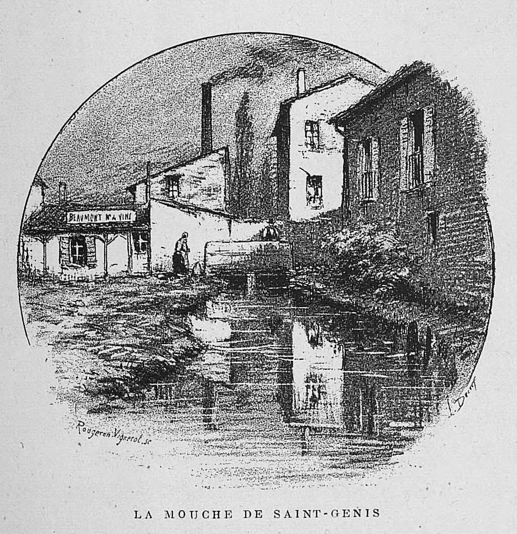 Aux environs de Lyon / Monsieur Josse ; préface de M. Coste-Labaume ; édition illustrée de 250 dessins de J. Drevet.